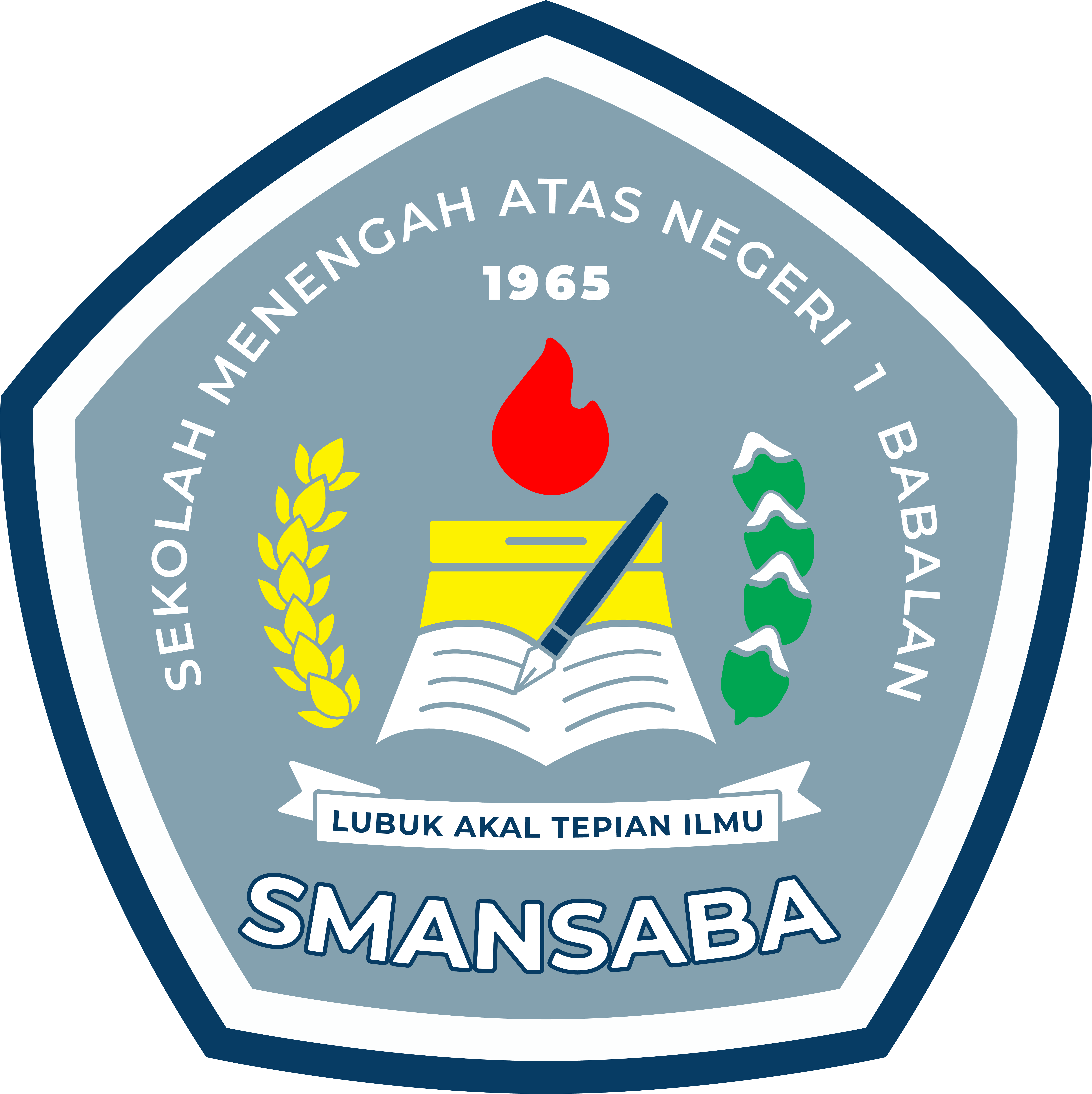 Logo SMA Negeri 1 Babalan Pembaruan Tahun 2020